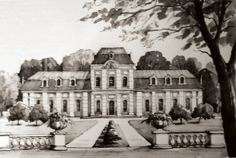 Беларуская (тарашкевіца): Слонім (Słonim), вуліца Опэрная (vulica Opernaja). Тэатар Агінскага